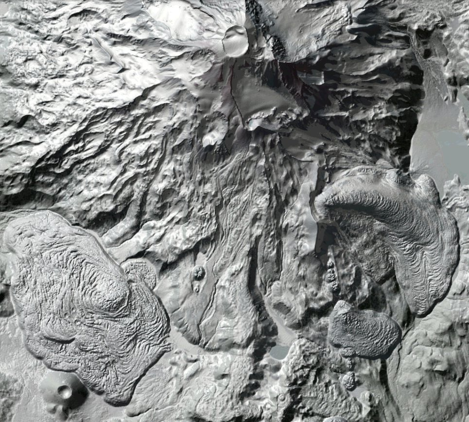 Capture Lidar du versant sud de South Sister, dans la chaîne des Three Sisters, montrant aussi Mesa Rock en bas à gauche.